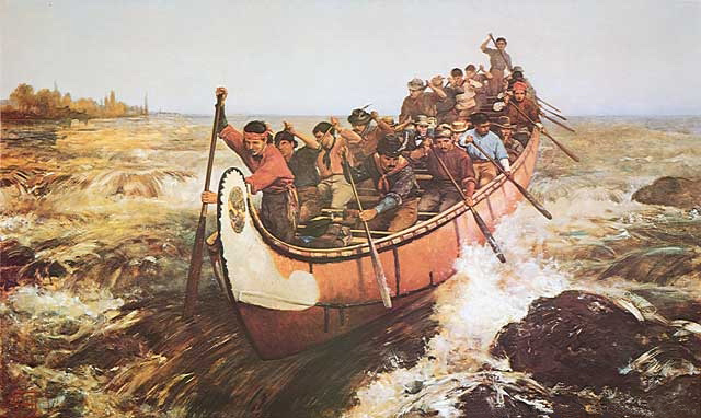 qu'on peut traduire par Descente de rapide. Rabaska descendant un rapide. Ce tableau dépeint un rabaska et son équipage dans une descente de rapide. On distingue environ dix-sept hommes et une femme à bord. Le mari de Mme Hopkins travaillait pour la compagnie de la Baie d'Hudson et Mme Hopkins accompagnait son mari lors de ses voyages. Sur le tableau, une femme apparaît à gauche du pagayeur avec une chemise bleue. Probablement un auto-portrait de Mme Hopkins.[1]